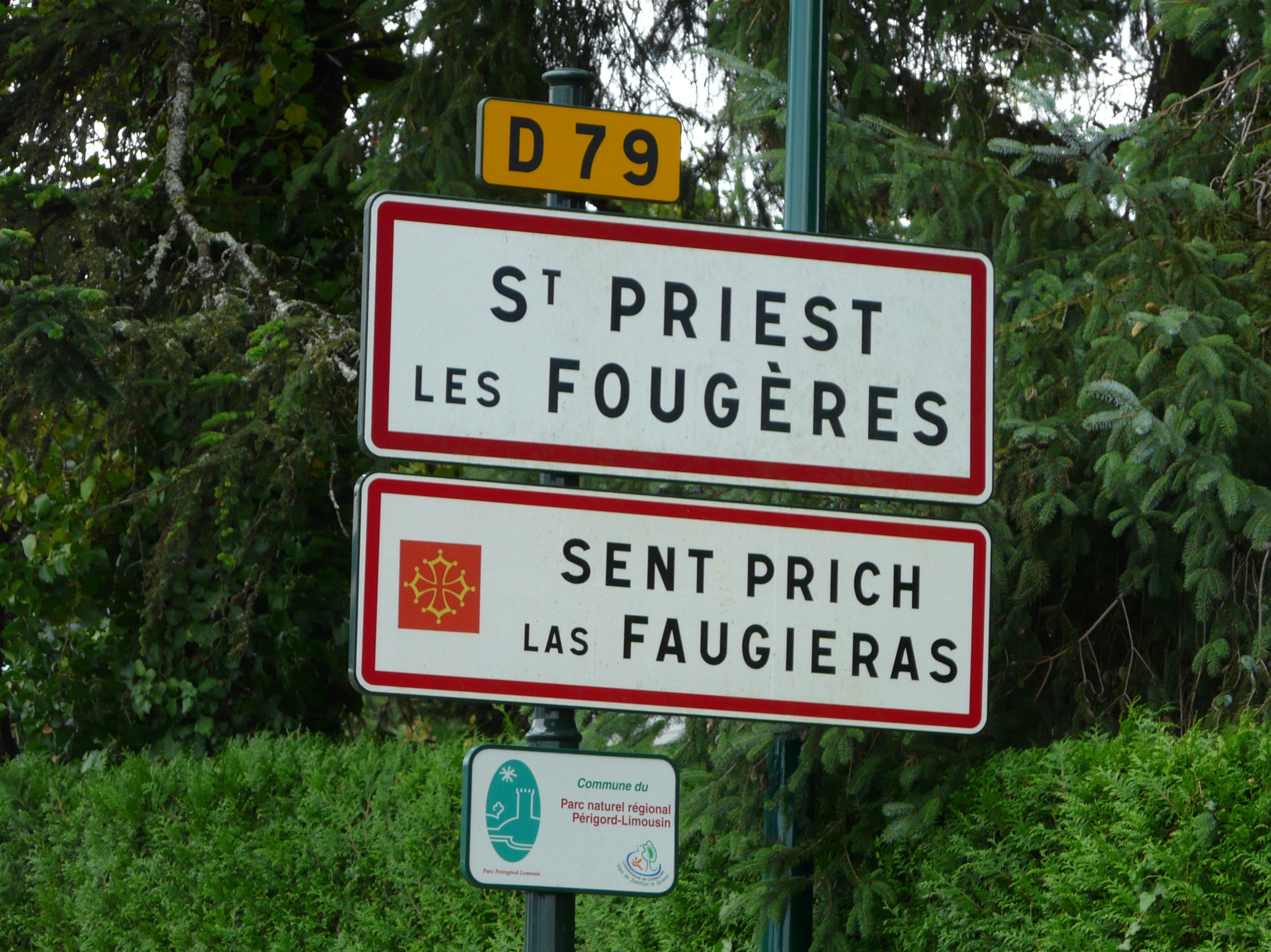 Sur la route départementale 79, panneau bilingue français-occitan d'entrée dans Saint-Priest-les-Fougères, Dordogne, France.